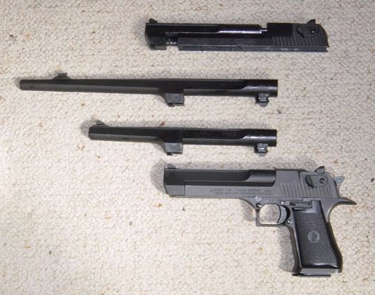 Desert Eagle Pistole MK VII in .44 Magnum, 6 Zoll Lauf mit Wechselläufen 44 Magnum in 10 und 14 Zoll Wechselsystem Mk VII in 357 Magnum Das Bild habe ich selbst von meinen eigenen Waffen aufgenommen. Das Bild darf frei verwendet werden. Auf Wunsch kann ich auch eine hochauflösende Version bereitstellen. 15:06, 13. Okt 2005 Darkone 640 x 480 (68699 Byte) (Auf eine alte Version zurückgesetzt) 03:13, 12. Okt 2005 Chronial 374 x 306 (16534 Byte) (Freigestellt) 06:23, 28. Mai 2005 Frogger 640 x 480 (68699 Byte) (Desert Eagle Pistole MK VII in .44 Magnum, 6 Zoll Lauf mit Wechselläufen 44 Magnum in 10 und 14 Zoll Wechselsystem Mk VII in 357 Magnum Das Bild habe ich selbst von meinen eigenen Waffen aufgenommen. Das Bild darf frei verwendet werden. Auf Wunsch kann )